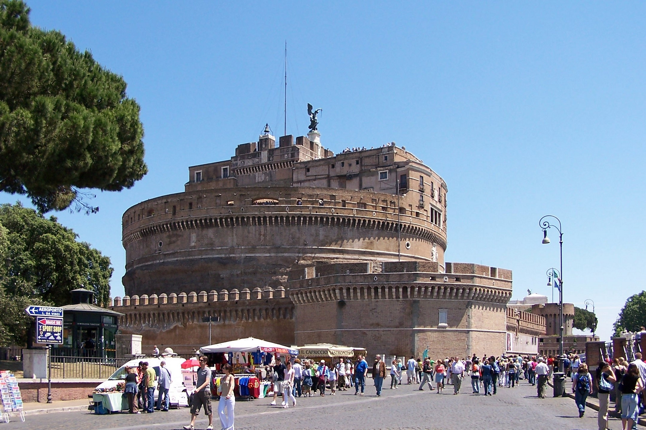 Rom, Die Engelsburg